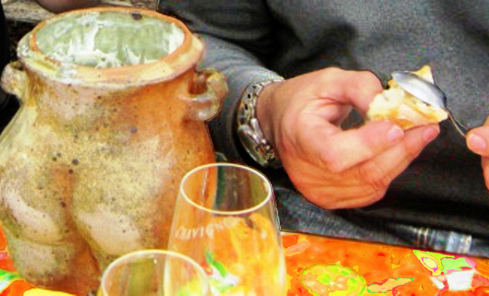 Dégustation de fort du Ventoux